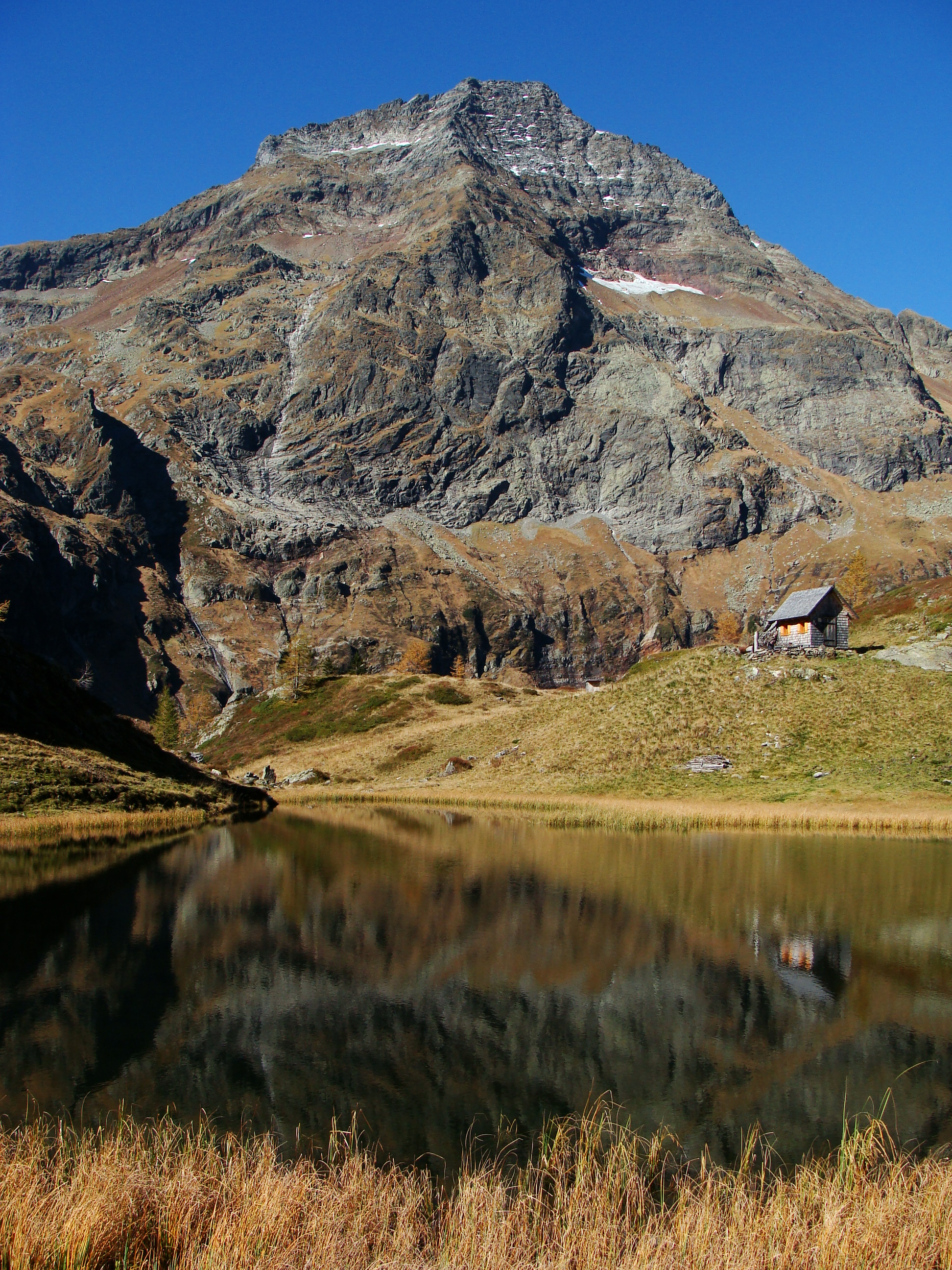 Hochgolling mit Gralatisee in Lessach, in den Niederen Tauern.